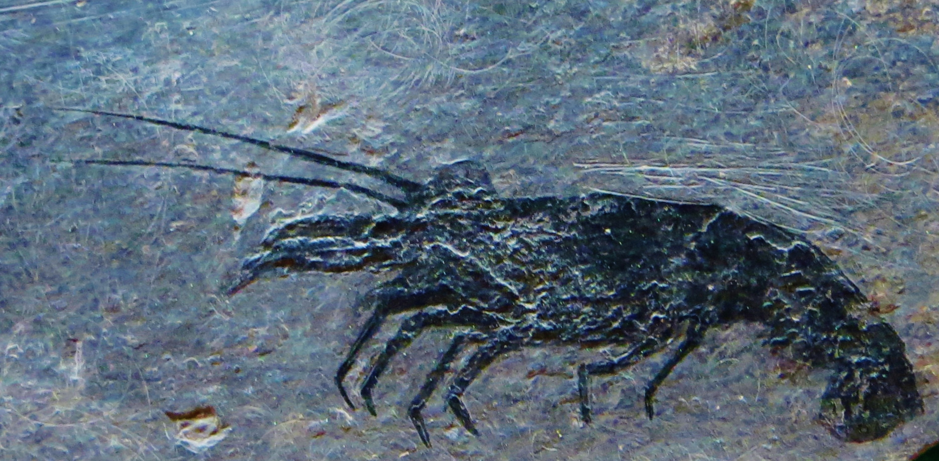 Fossil of Pseudoglyphaea, an extinct crustacean- Took the picture at Museo di Storia naturale “Antonio Stoppani” - Venegono Inferiore